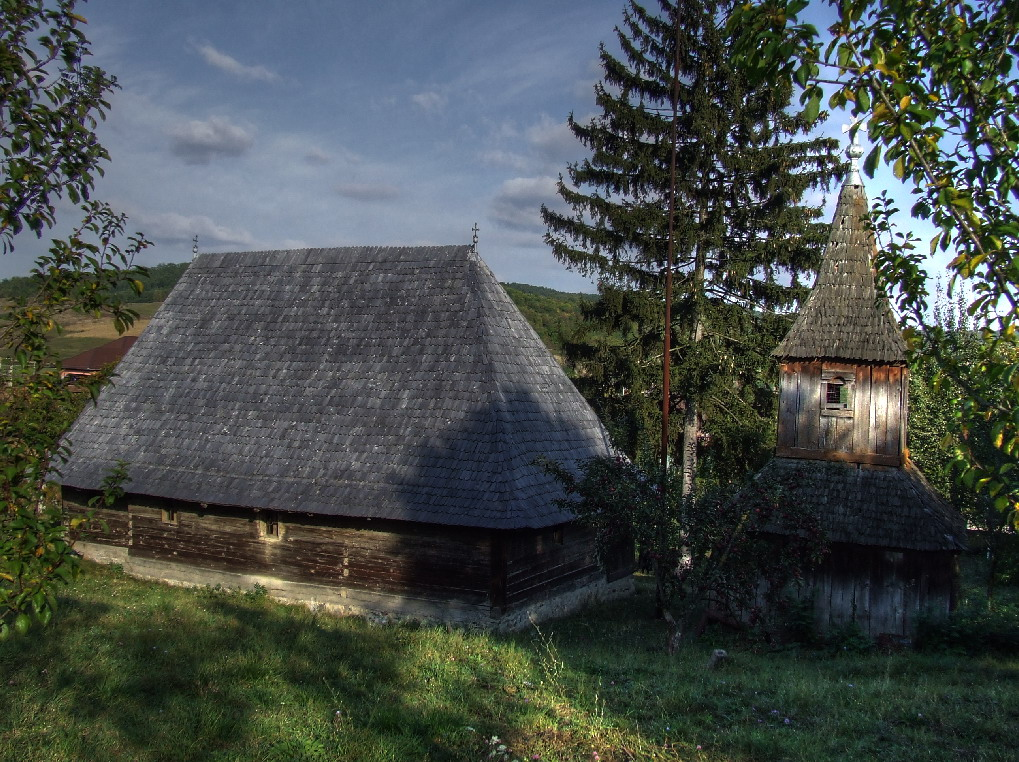 Biserica de lemn din Sărmăşel, judeţul Mureş. Vedere de ansamblu din nord-vest.